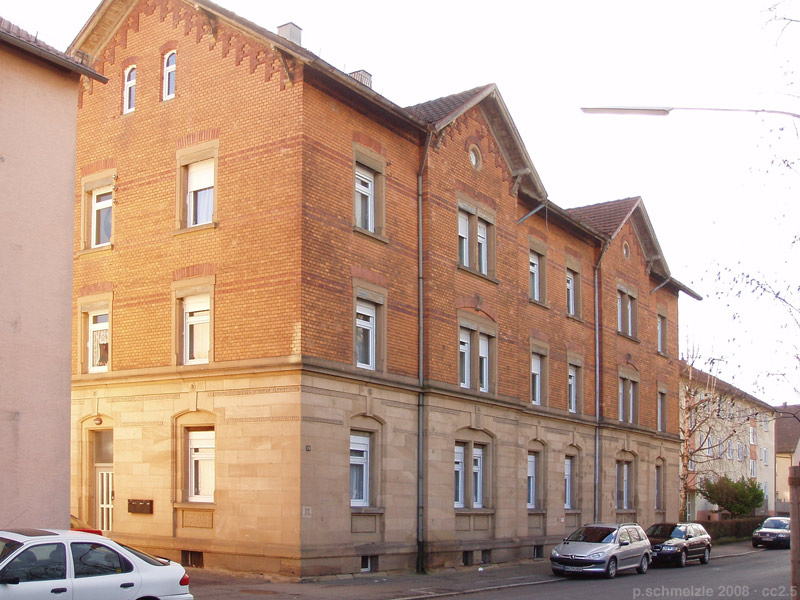 Gebäude Schmollerstr. 22-24 in Heilbronn